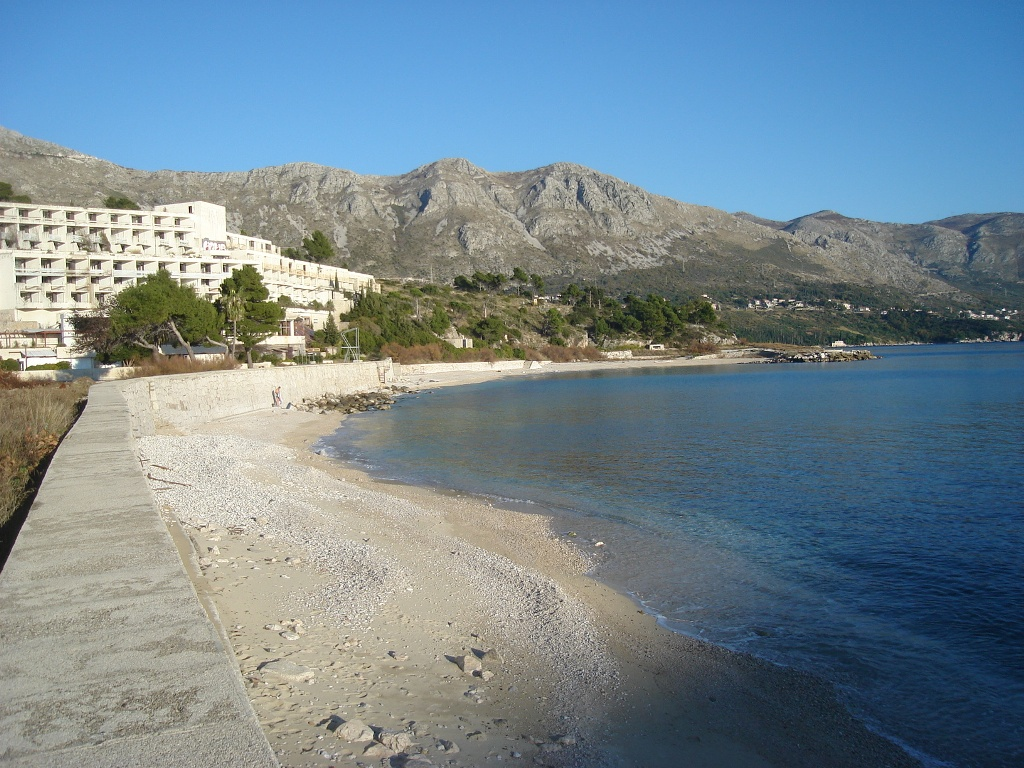 plaža u Kuparima